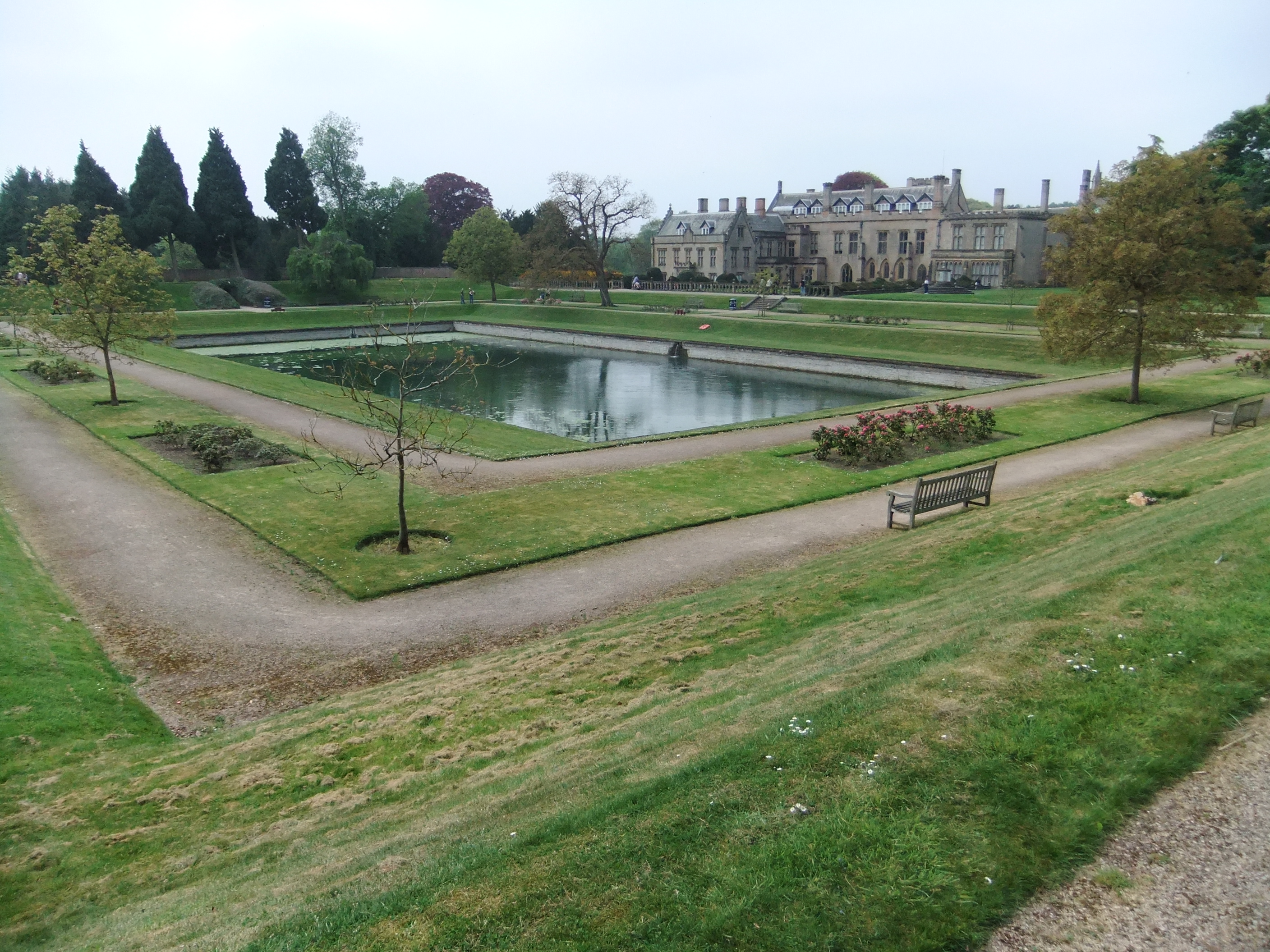 Eagle Pond im Großen Garten von Newstead Abbey